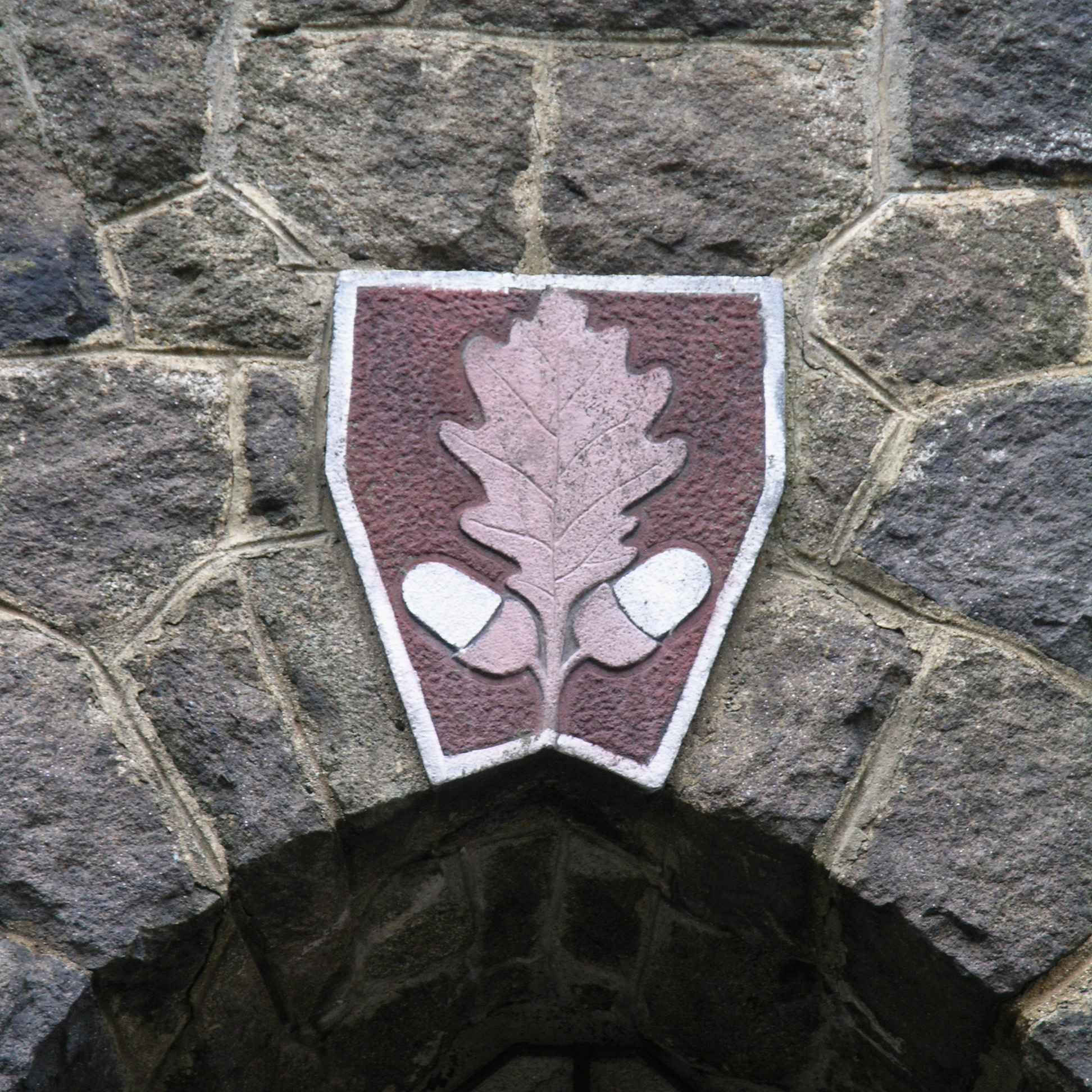 Tanečnice